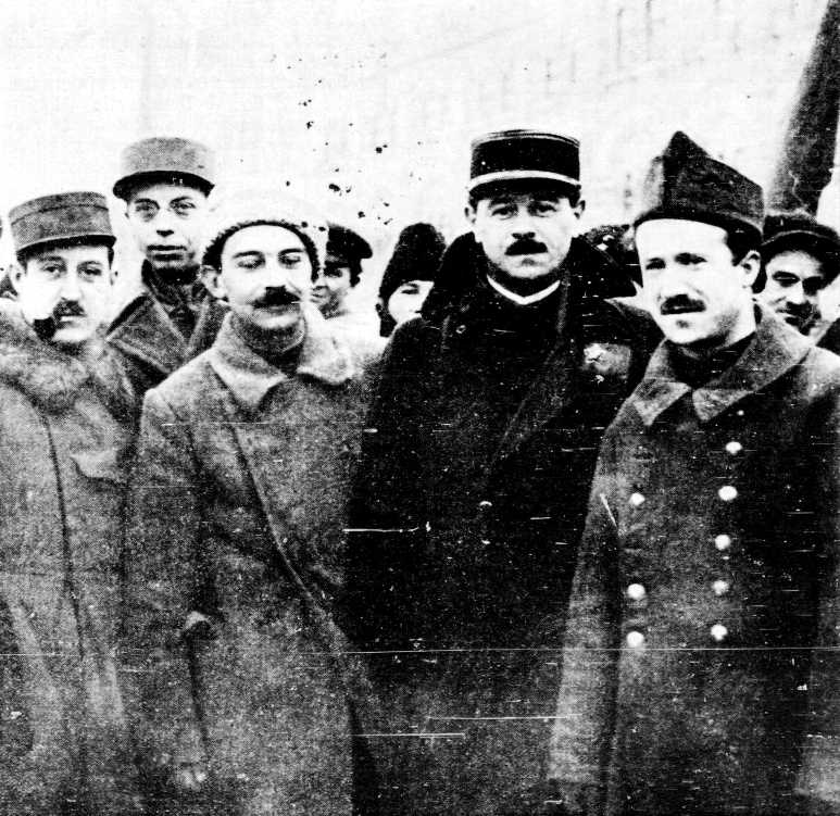 D'esquerra a dreta: Robert Petit, Pierre Pascal, Jacques Sadoul i Marcel Body (Rússia, 1922)